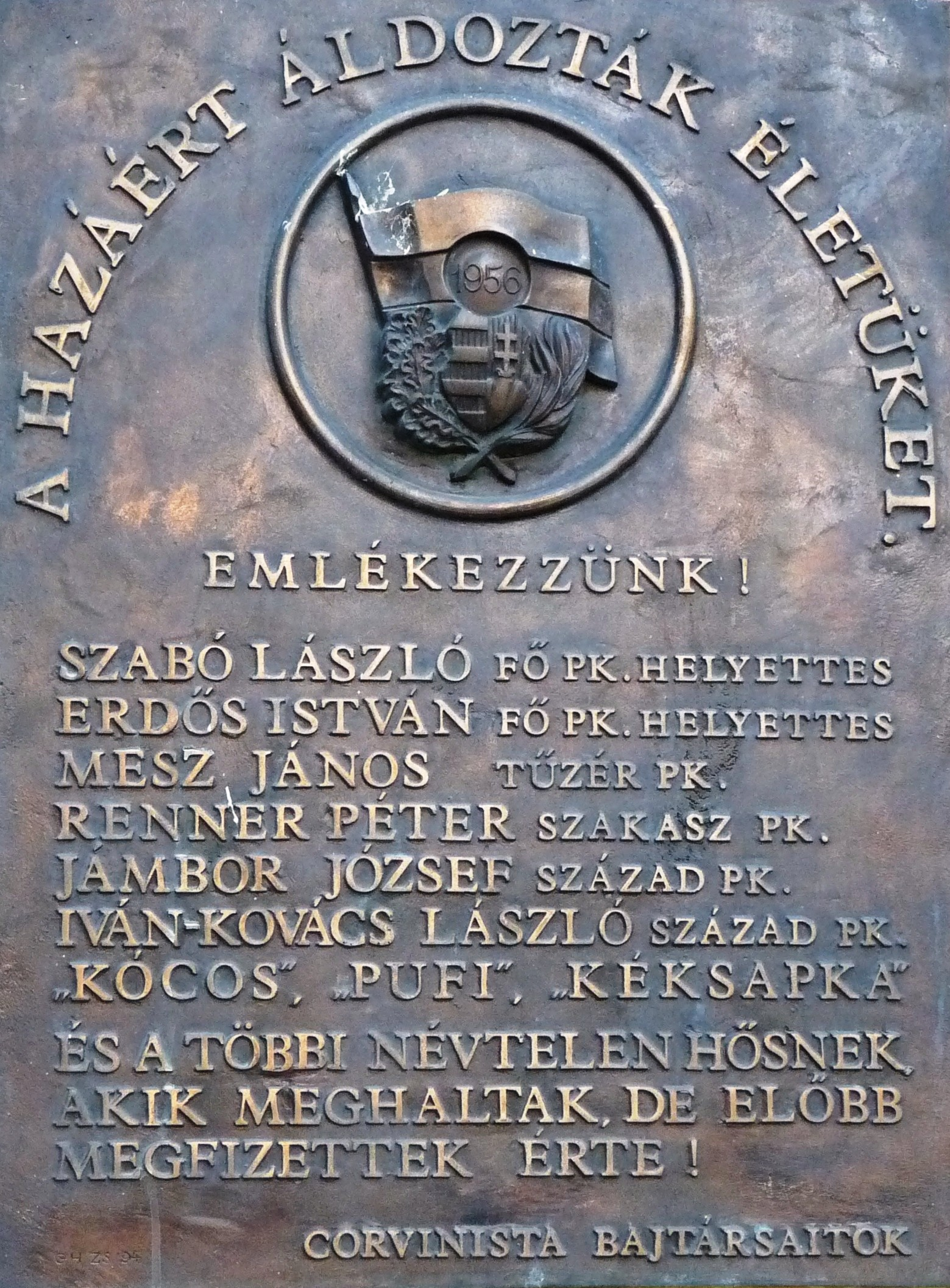 Az 1956-os forradalom Corvin közi mártírjainak emléktáblája a mozi homlokzatán. A bronz dombormű Gulácsy-Horváth Zsolt szobrász alkotása. Budapest, VIII. ker. Corvin köz 1. Felirata: A hazáért áldozták életüket. Emlékezzünk! Szabó László fő pk. helyettes Erdős István fő pk. helyettes Mesz János tüzér pk. Renner Péter szakasz pk. Jámbor József század pk. Iván-Kovács László század pk. „Kócos”, „Pufi“, „Kéksapka“, és a többi névtelen hősnek, akik meghaltak, de előbb megfizettek érte! Corvinista bajtársaitok A domborművön látható a Kossuth-címer, a forradalom lyukas zászlója, az 1956 évszám, és lombos ágak. Másik fénykép ugyanerről a tábláról: File:A hazáért áldozták életüket (9).JPG.